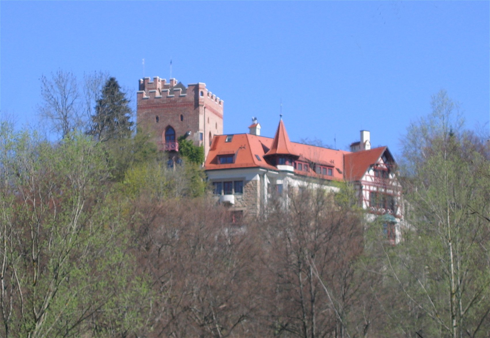 Burg Schwaneck, Pullach im Isartal, vom östlichen Isarufer gesehen